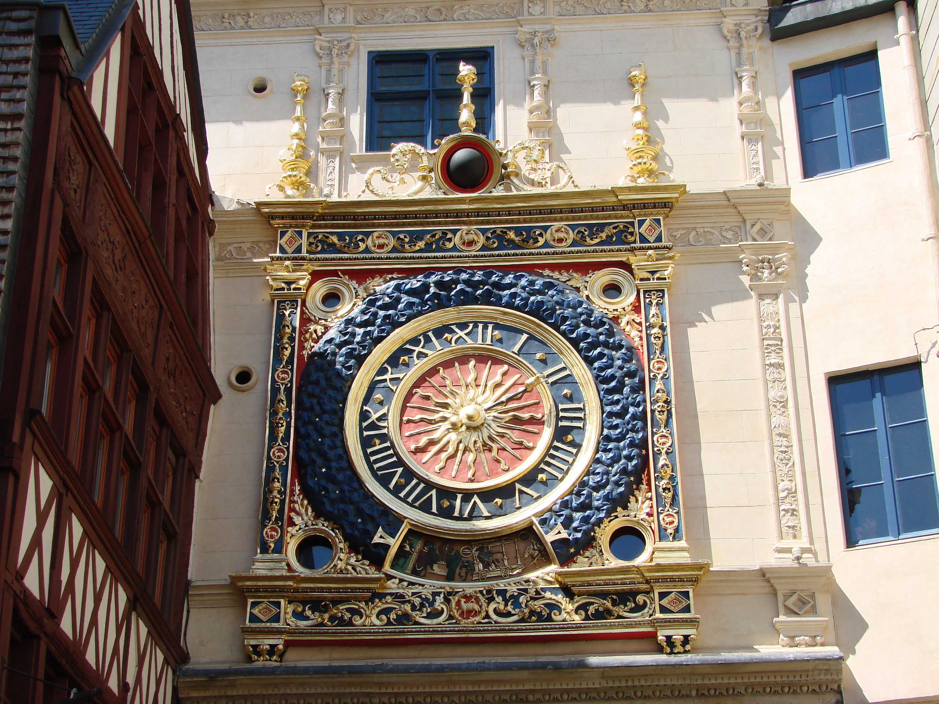 Rouen (Seine-Maritime, France) Le Gros-Horloge. .